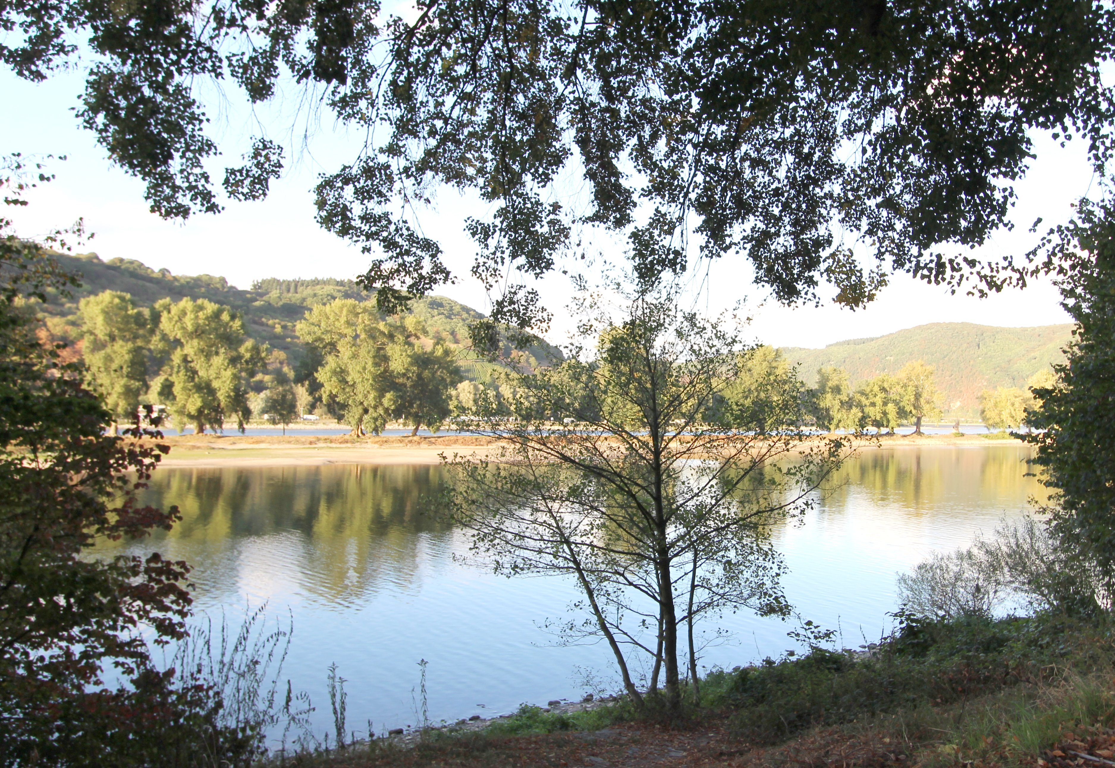 56340 Osterspai. Naturschutzgebiet "Auf der Schottel" am Rheinufer. Aufnahme von 2016.